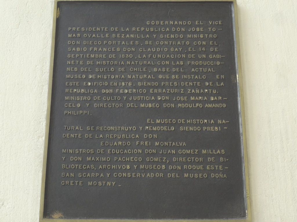 Placa que conmemora el final de los trabajos de restauración del MNHN, en 1968.